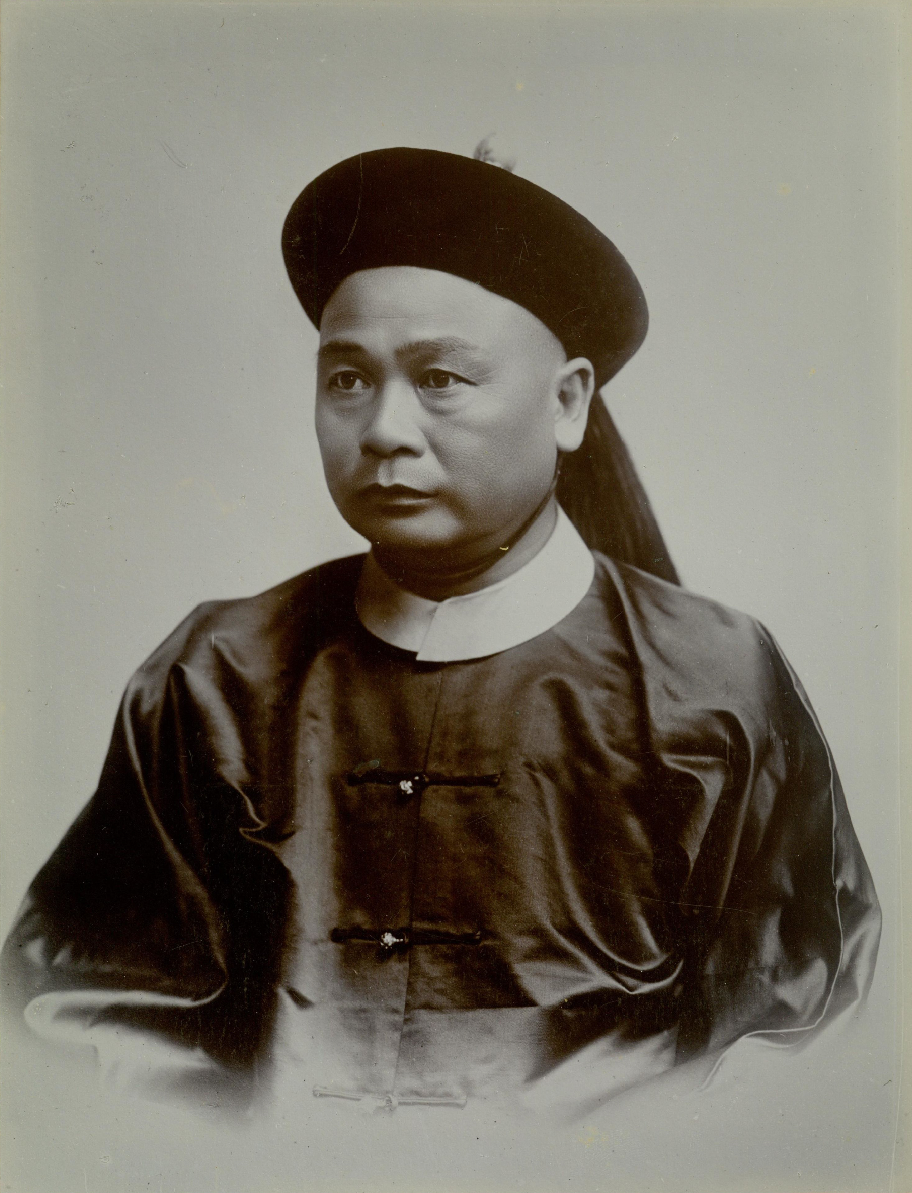 詹天佑（1861-1919 年）身着官服的半身照，摄于京张铁路建设期间